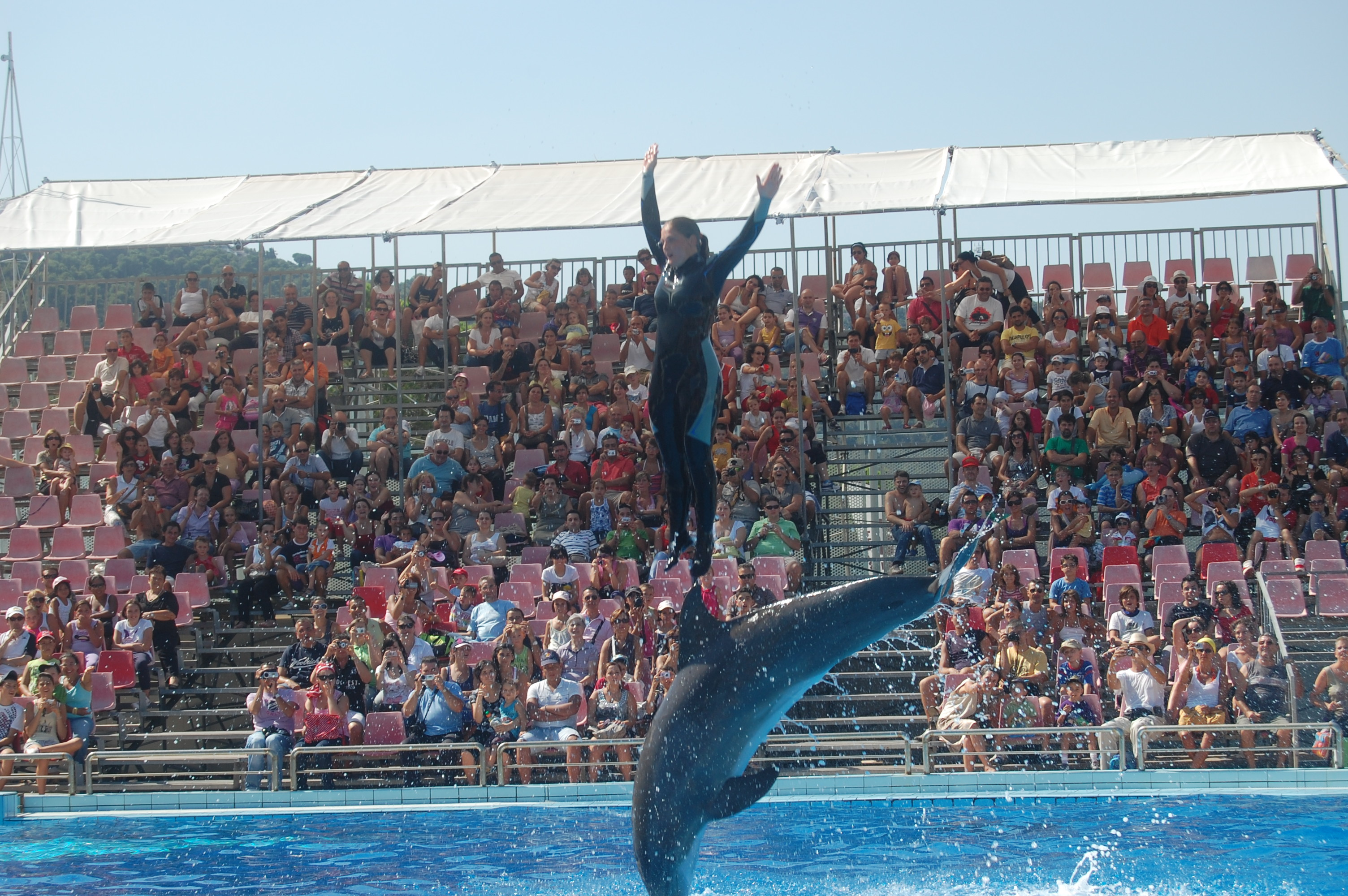 Zoosafari di Fasano (BR). Delfinario. Un momento dello spettacolo